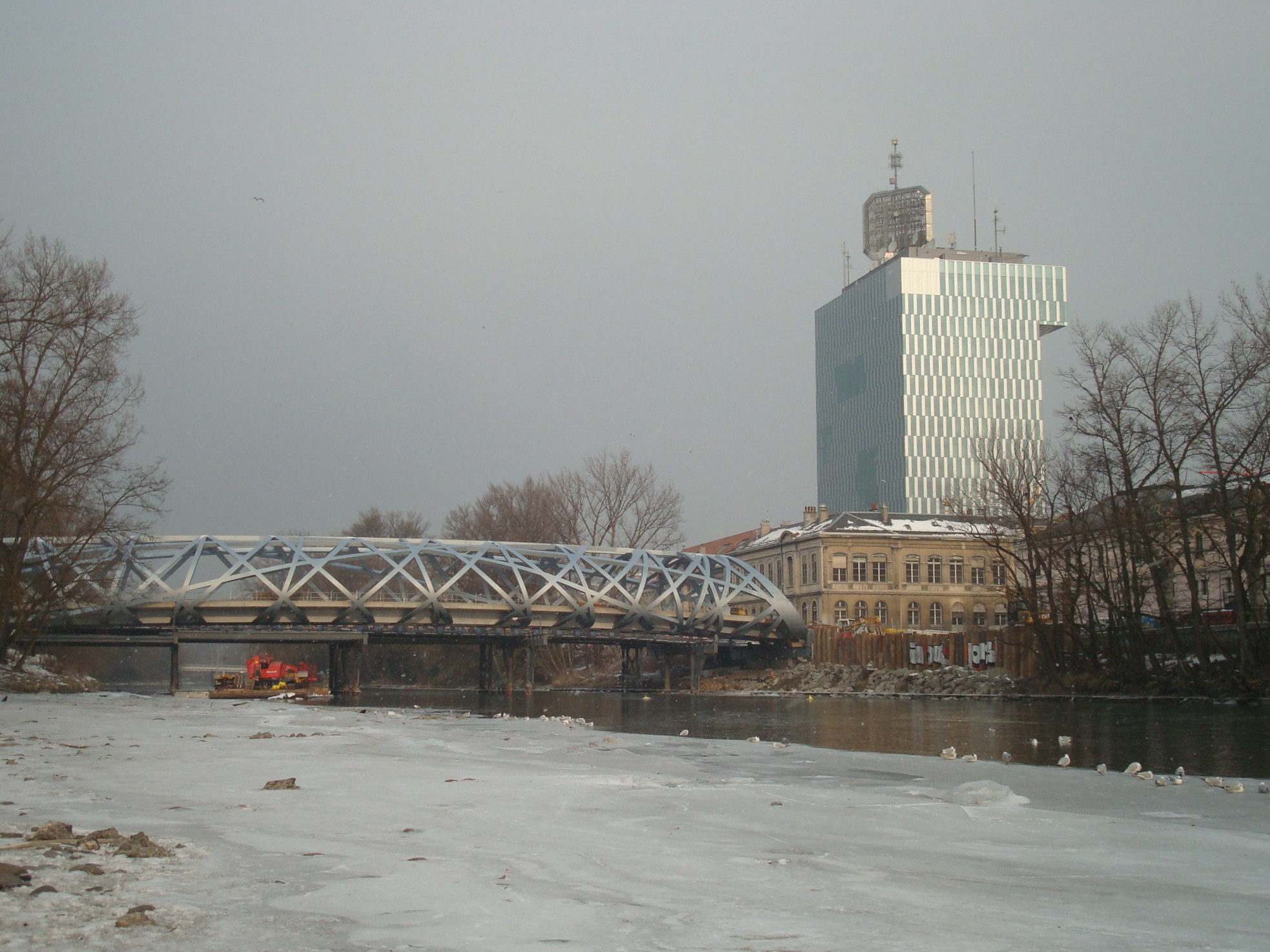 L'Arve gelé au premier plan. Le pont Hans Wilsdorf , 4 mois avant son inauguration. Dokumentations- und Archivzentrum der Télévision Suisse Romande Quai Ernest-Ansermet 20 , Genf KGS-Nr: 8970